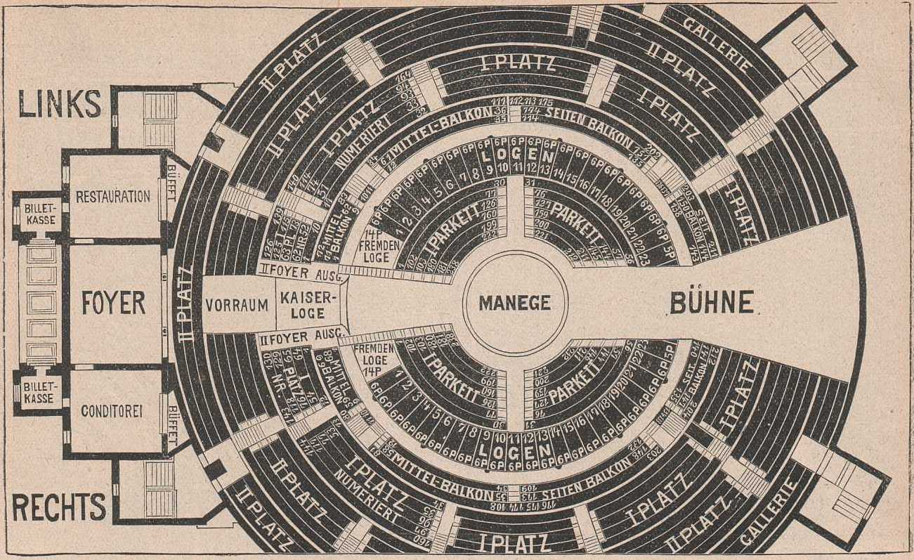 Rudolph Hertzog, Agenda 1912. Jahreskalender des Berliner Kaufhauses. Seite 110. Zirkus Busch in Berlin C, Bahnhof Börse. Leinen, 224 Seiten, 19,5 x 28,5 cm